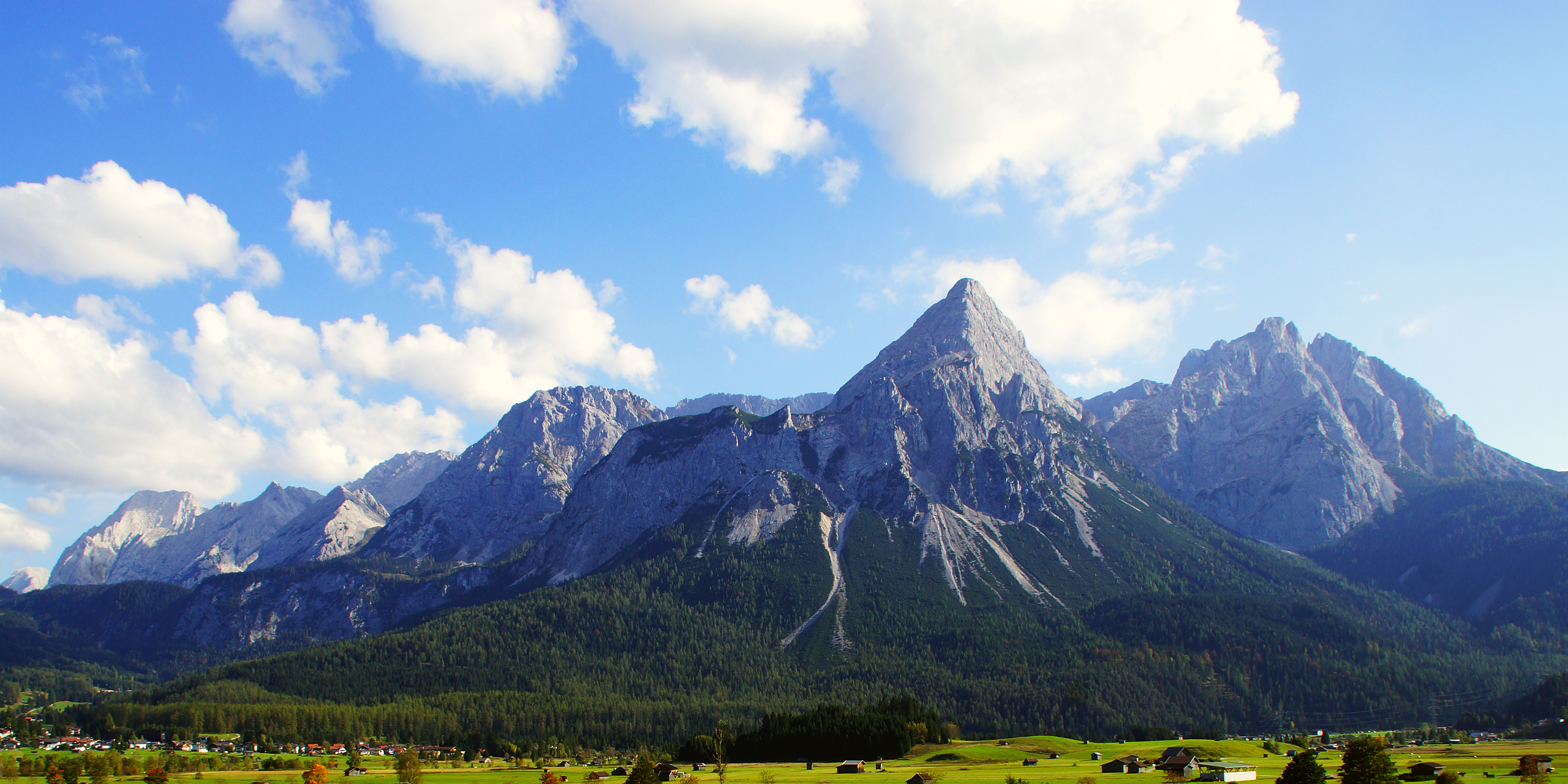 Talgrund Ehrwald Lermoos - Mieminger Gebirge durchschnittlich 2400 bis 2700 Meter hoch, die Ehrwalder Sonnenspitze 2417 m - Tirol Österreich - Foto Wolfgang Pehlemann DSC02164